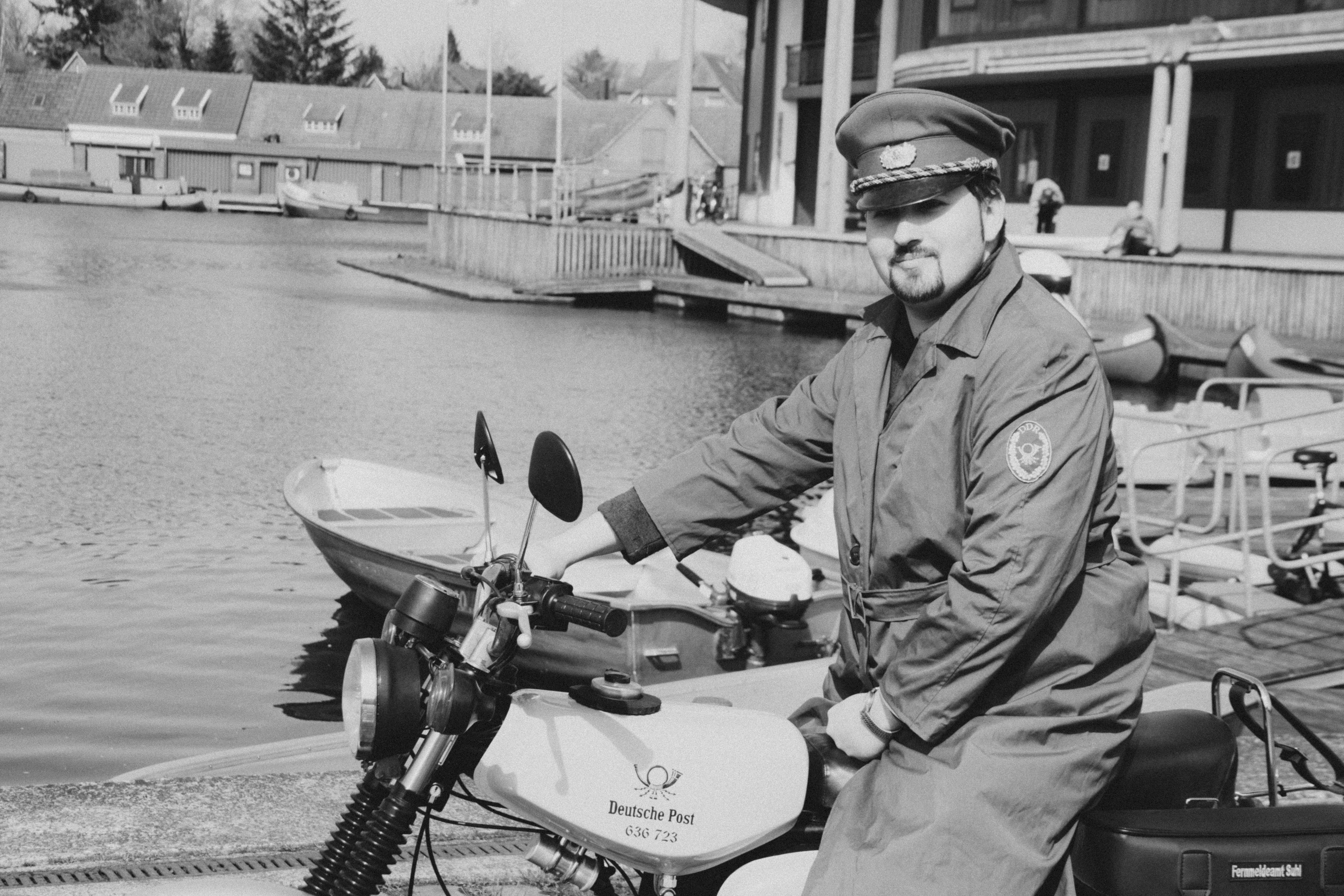 SIMSON S51 B2-4 der DDR Deutsche Post von 1981 für den Telegramm und Fernmeldedienst